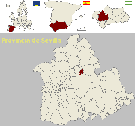 Mapa de localización del municipio sevillano de Alcolea del Río (Andalucía, España)